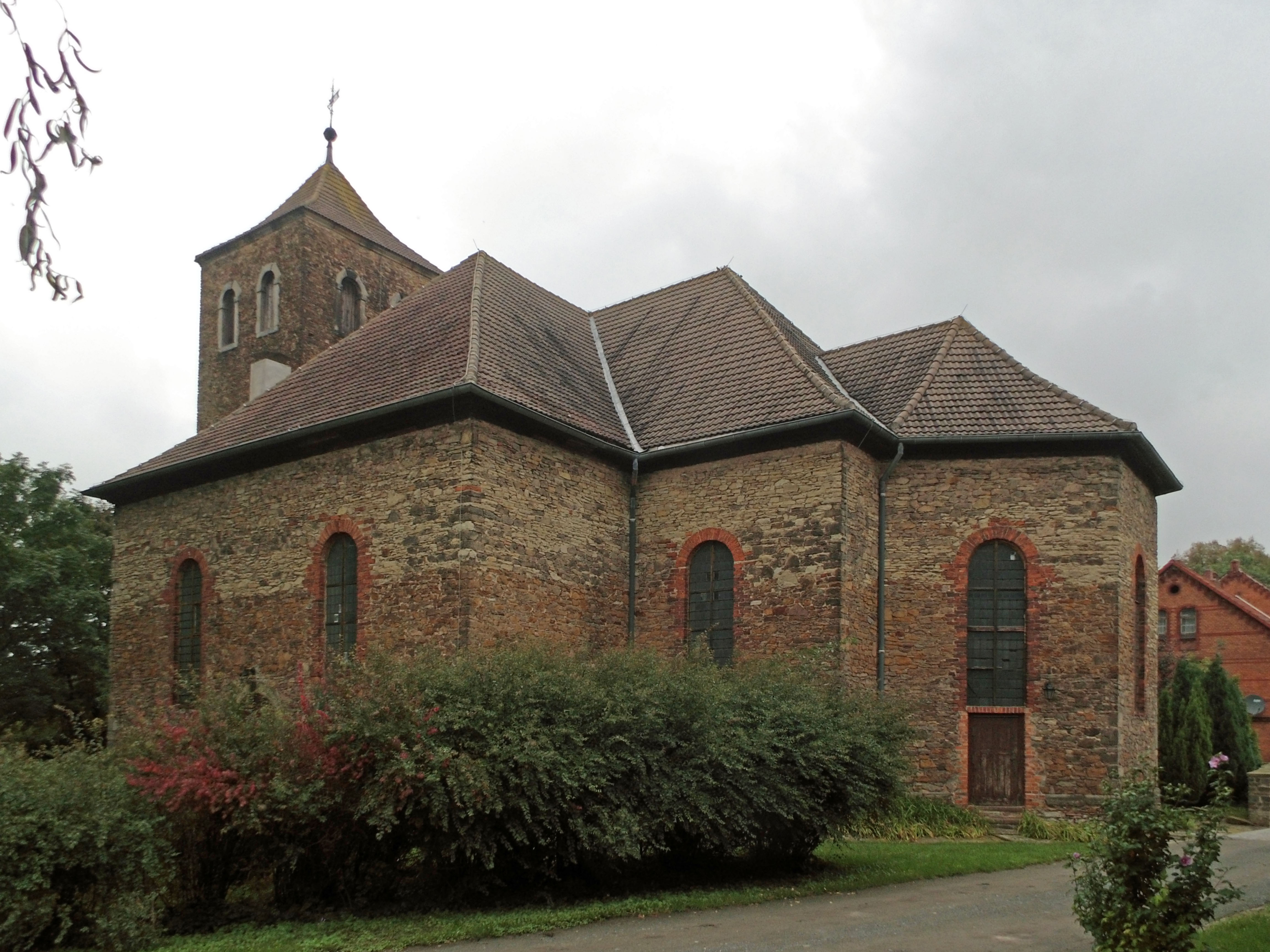 Evangelische Kirche in Erxleben (Landkreis Börde).